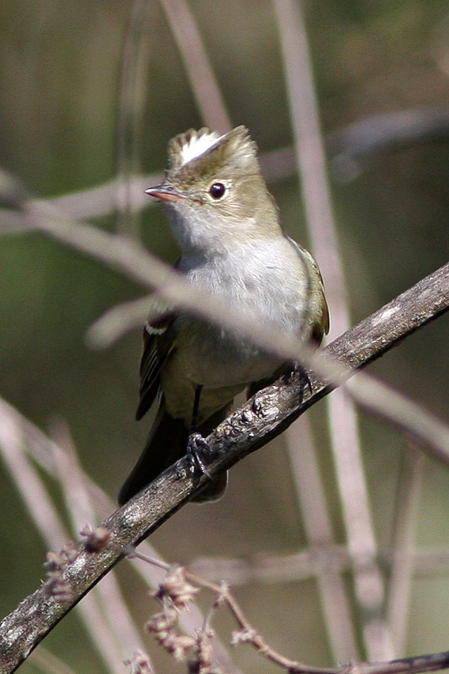 Salta to Uquia, Jujuy